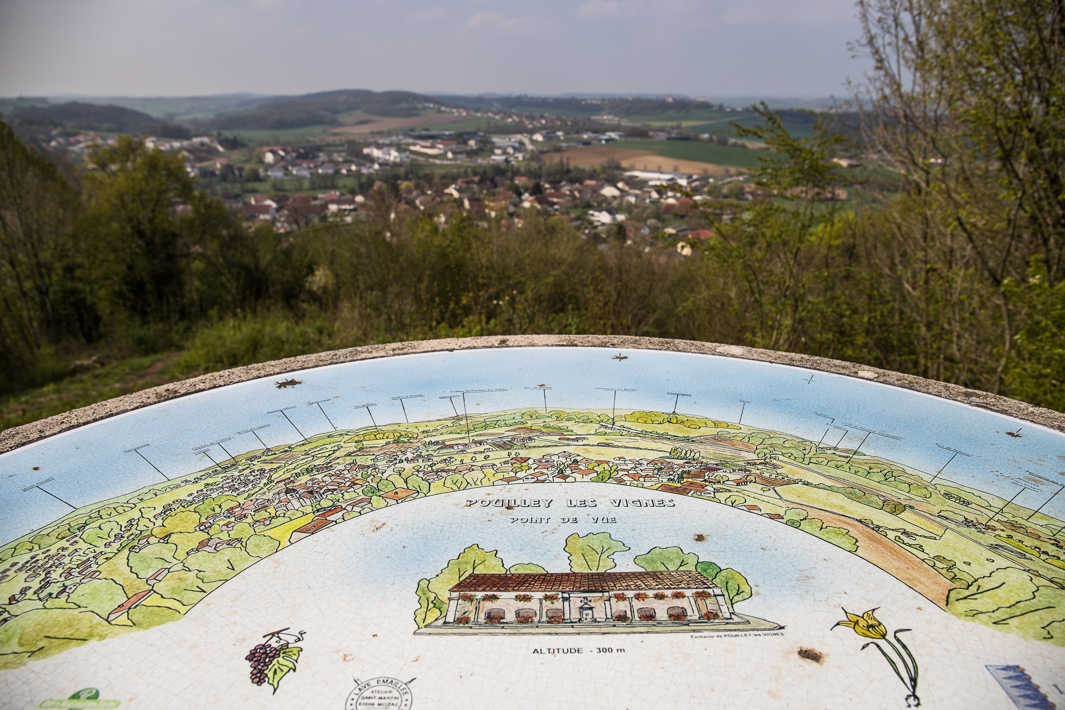 Vue de la commune de Pouilley les Vignes depuis le belvédère dominant la commune.